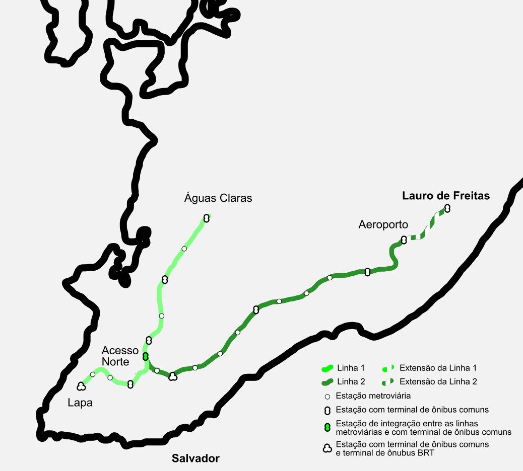 Mapa do traçado do metrô de Salvador, sem distinção das estações construídas, a serem construídas ou planejadas.